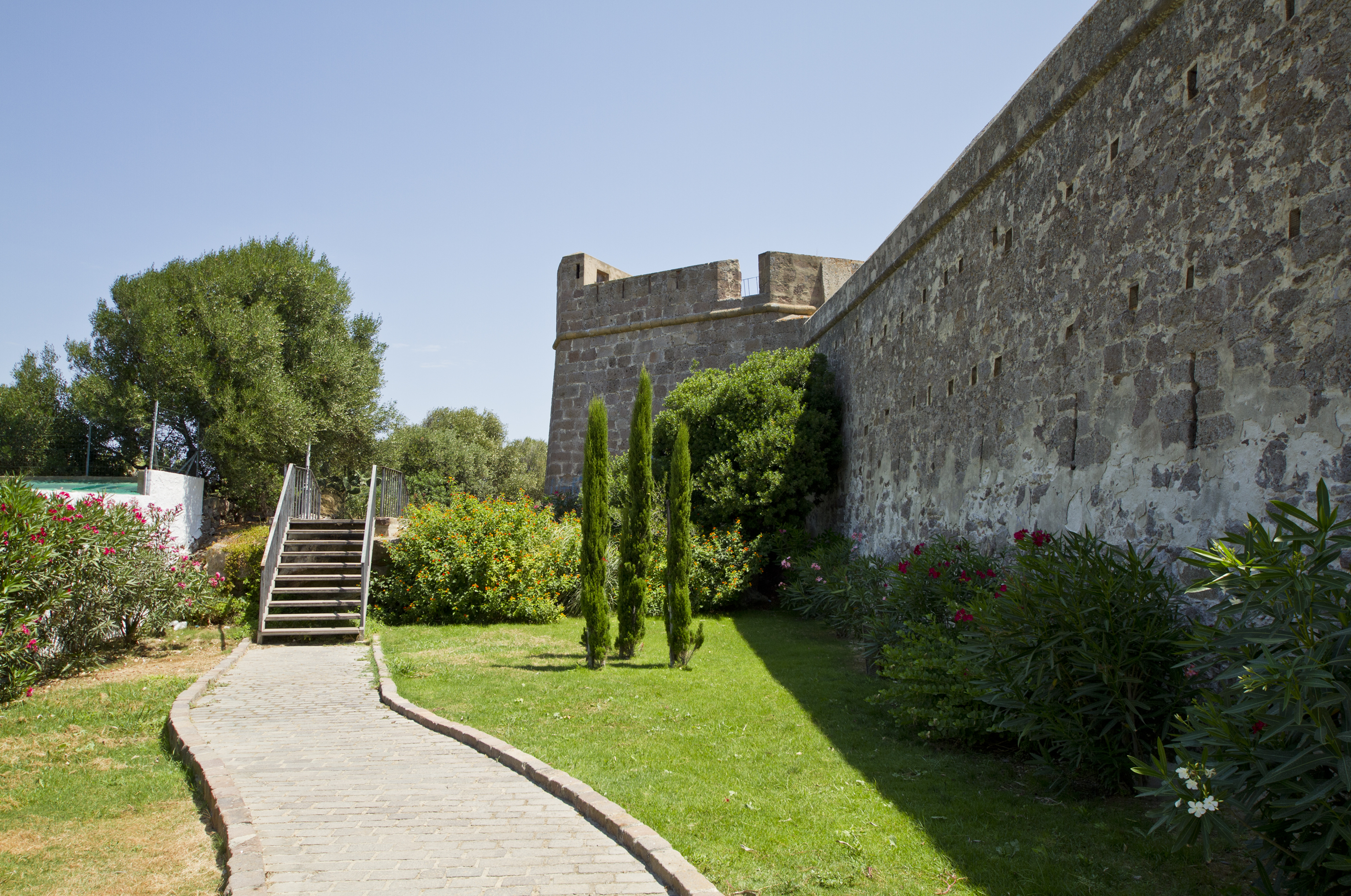 Forte Santa Teresa, Carloforte, Isola di San Pietro, Carbonia-Iglesias, Sardinia, Italy